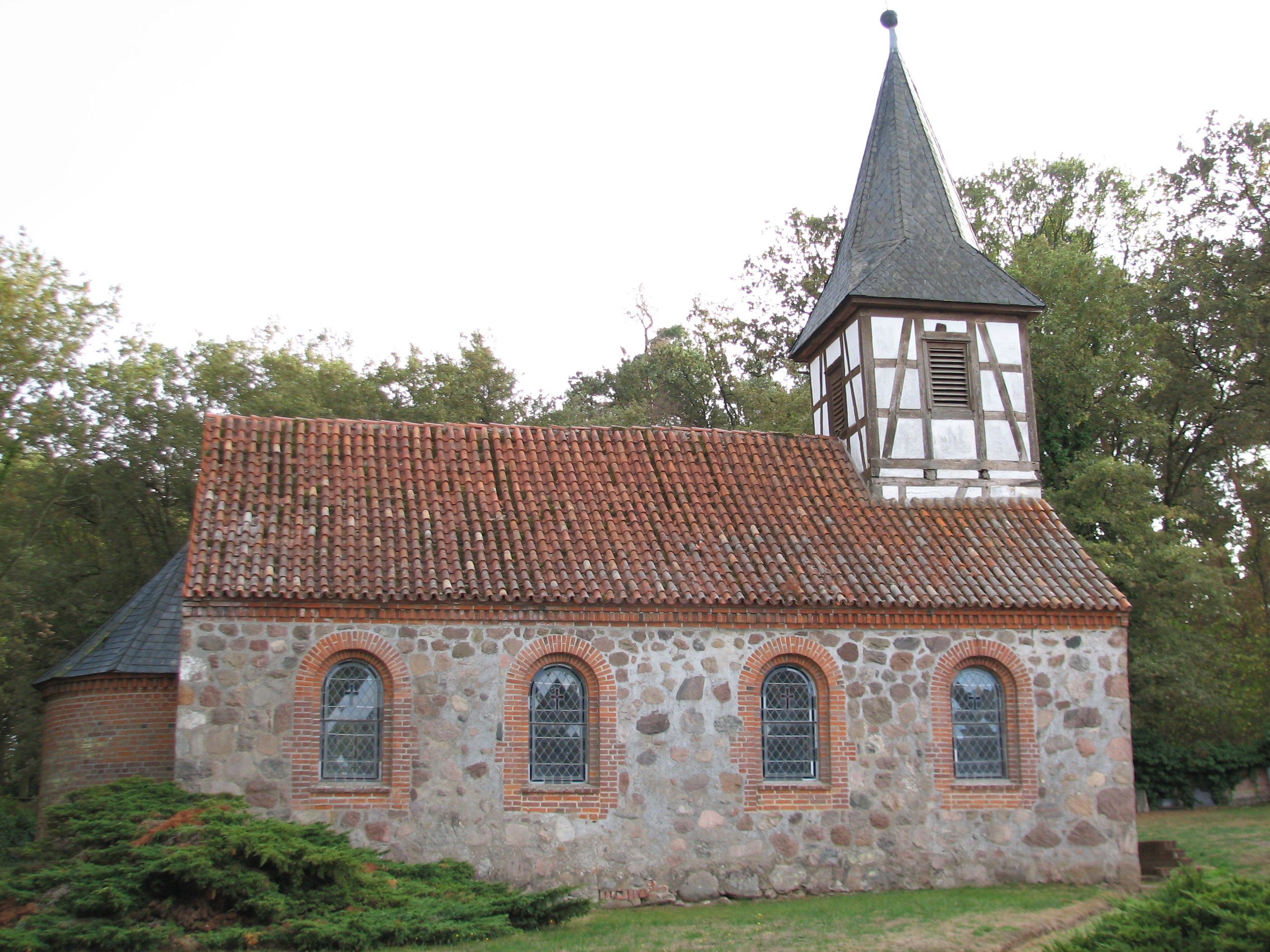 Kirche zu Störpke (2018)